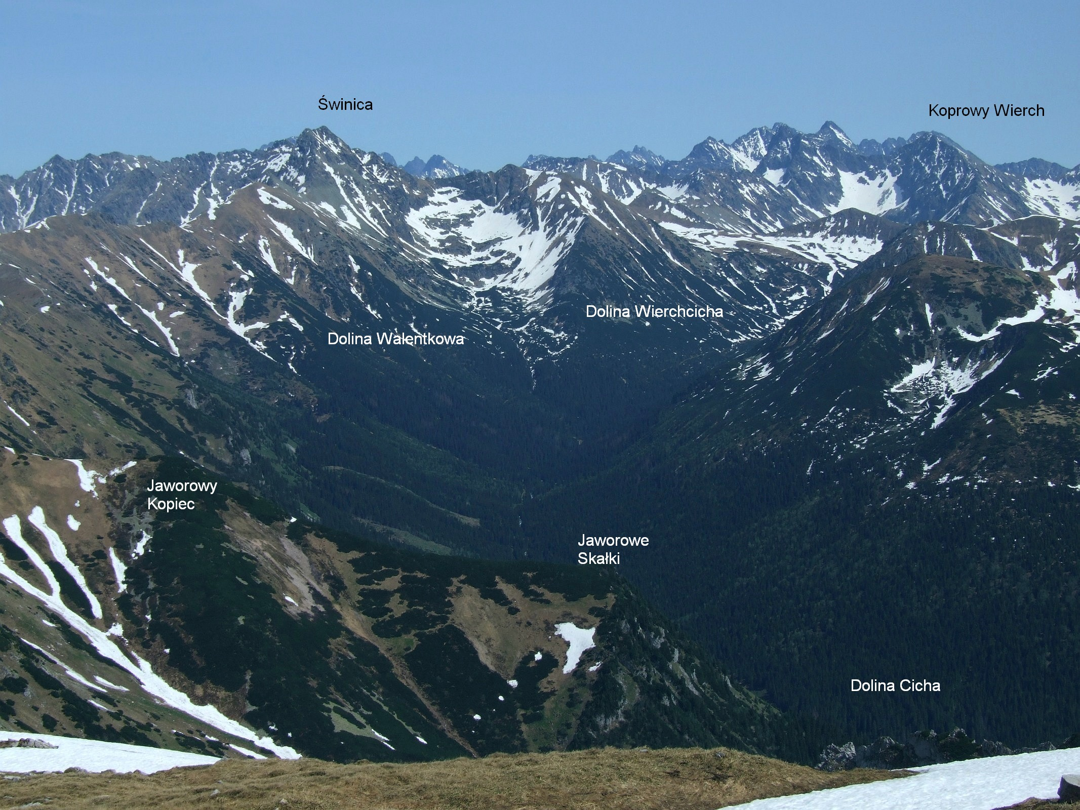 Dolina Cicha i Tatry Wysokie. Widok z Krzesanicy